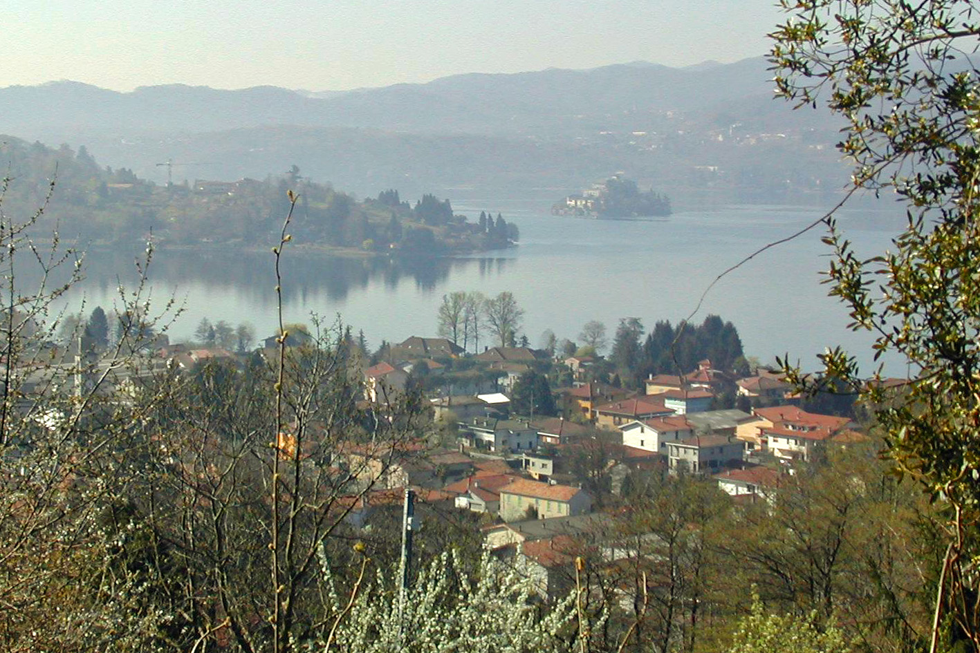 Pettenasco (provincia di Novara); foto di Pierluigi Tracanzan